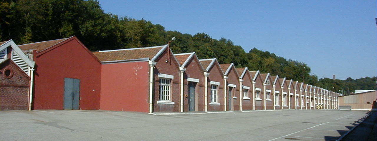 Usine Desgenetais